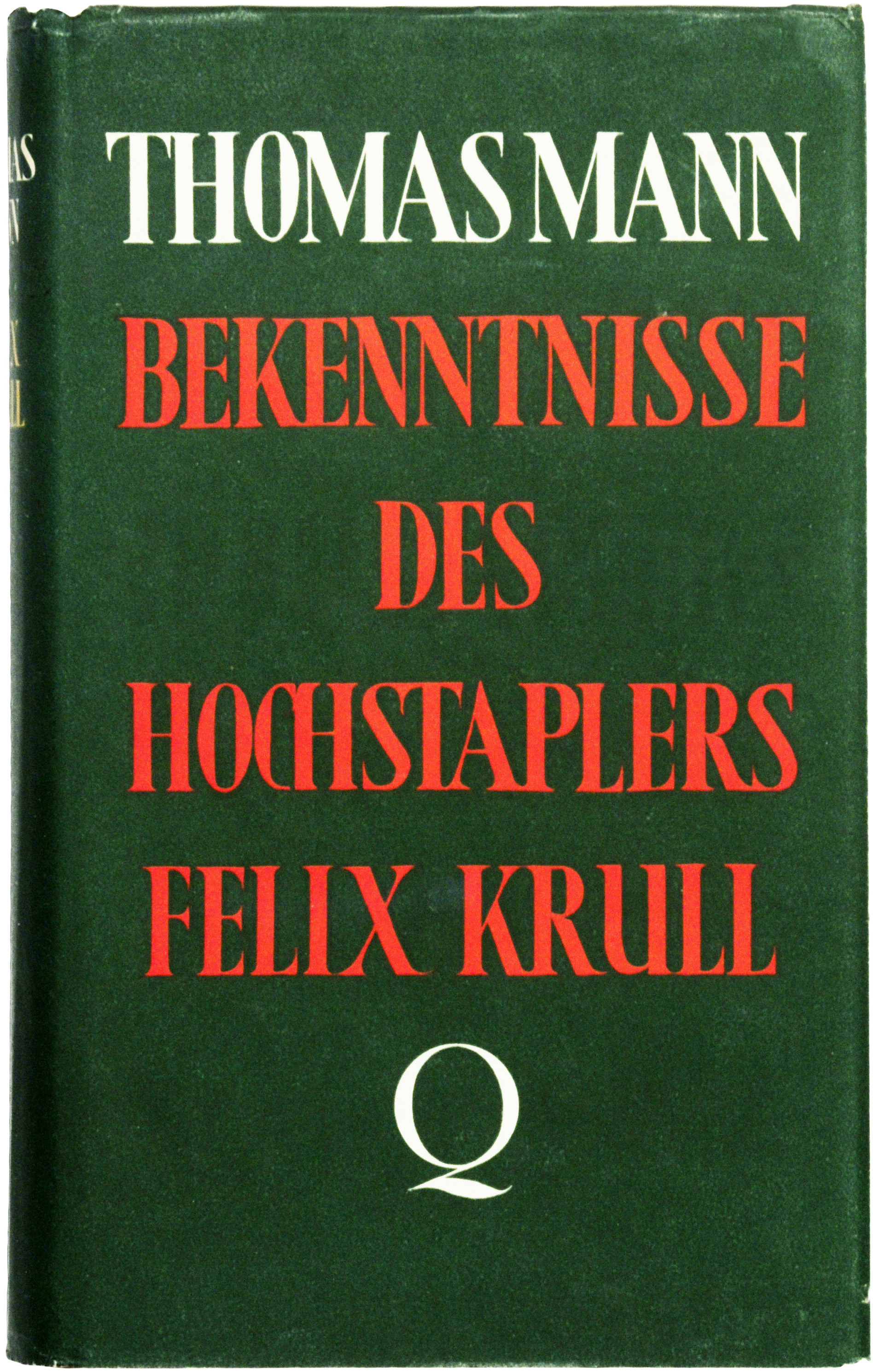 Mann, Thomas: Bekenntnisse des Hochstaplers Felix Krull. [Um 5 Kapitel vermehrt gegenüber den Drucken von 1922 und 1923]. Amsterdam: Querido 1937, 177 Seiten. Original-Verlagsumschlag (in Klarsichtfolie eingelegt). Erstausgabe (Potempa D 12.2.1).